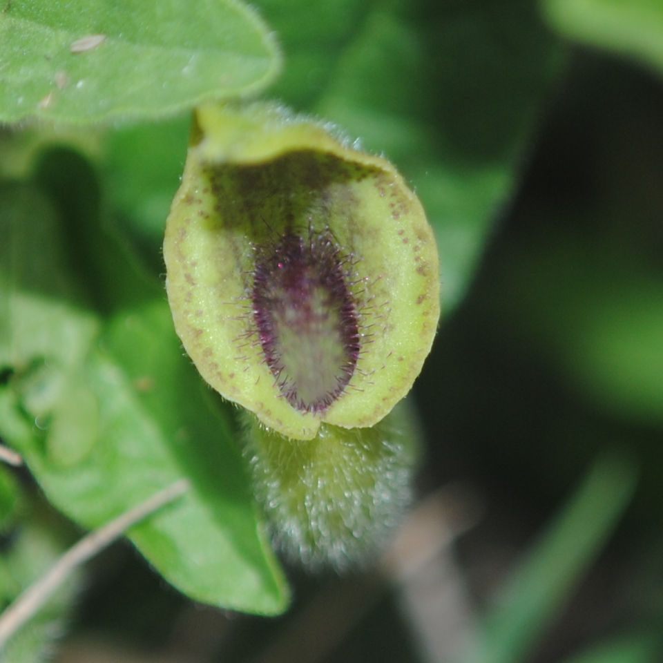 Aristolochia stuckertii. Aristolochiaceae. Fotos tomadas en suelos rocosos y arcillosos bajo bosque ribereño al margen del Río Negro y a la sombra en lugares húmedos en Palmar, departamento de Soriano, Uruguay.